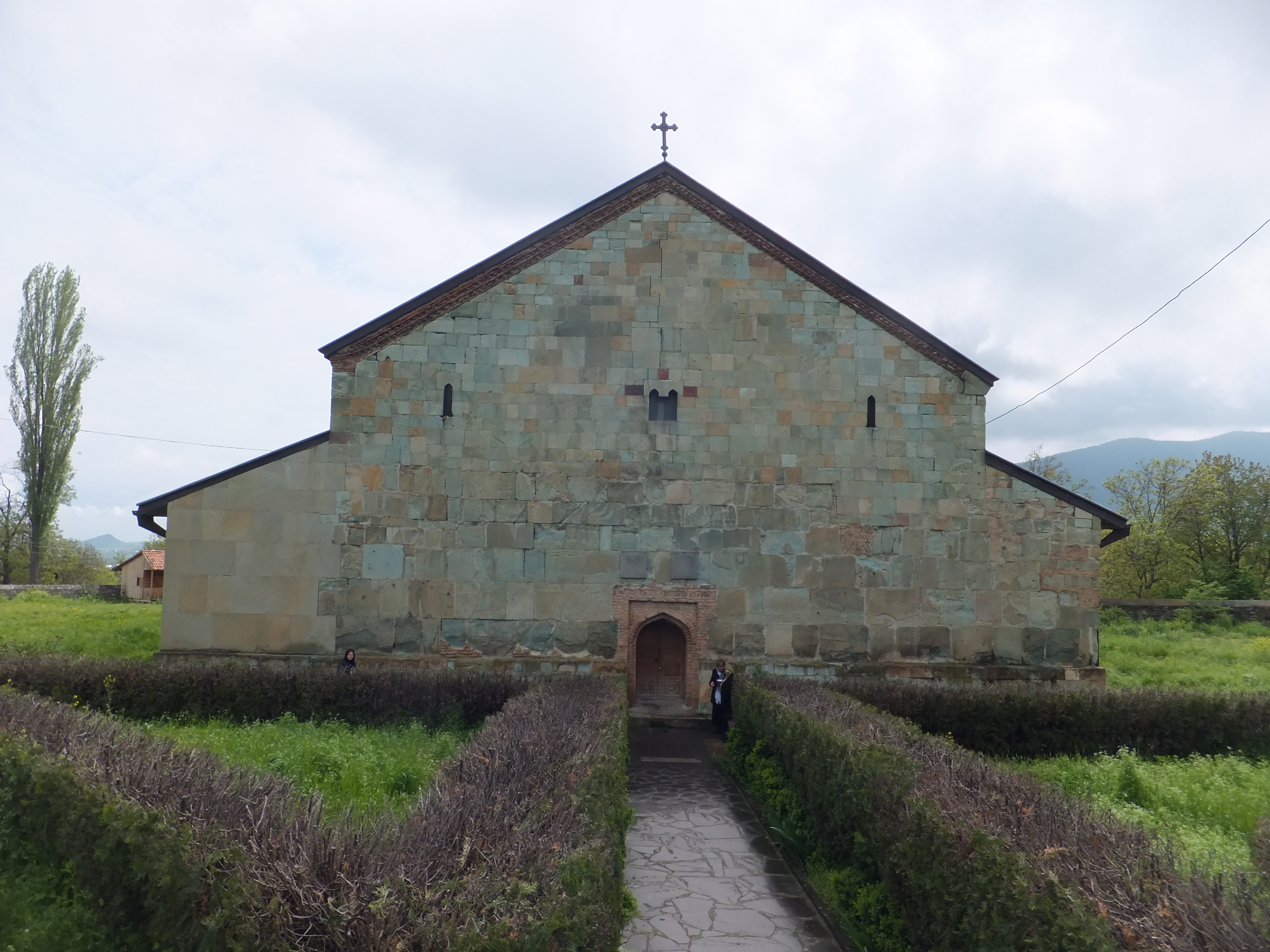 ბოლნისის სიონი სამრეკლო და გალავანი